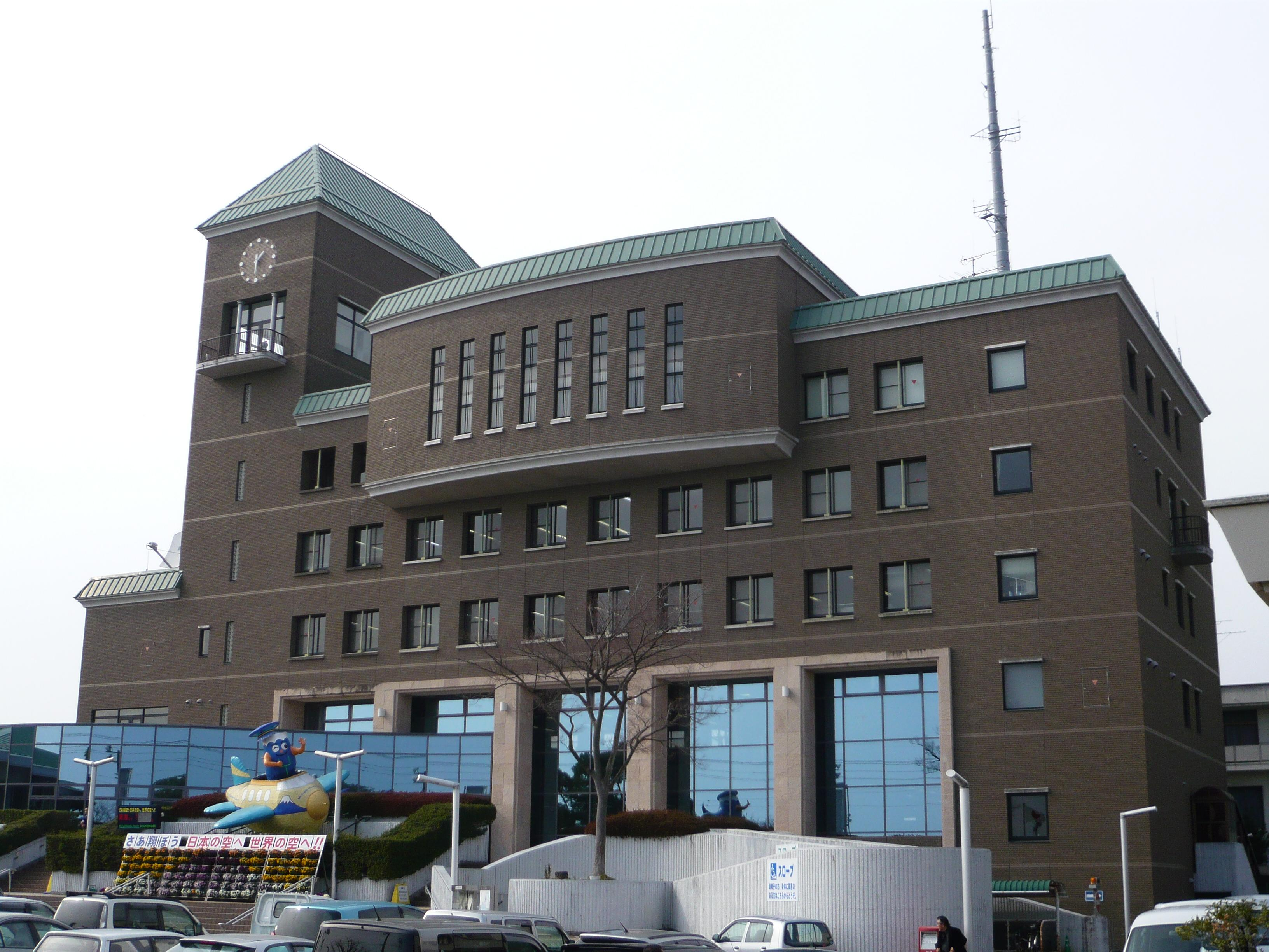 牧之原市役所 榛原庁舎